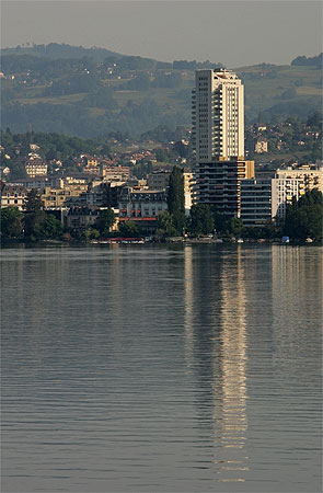 Montreux im Morgenlicht